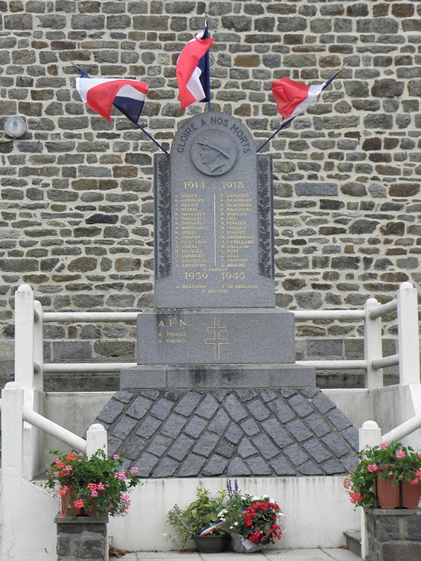 Monuments aux morts de Trévérien (35).